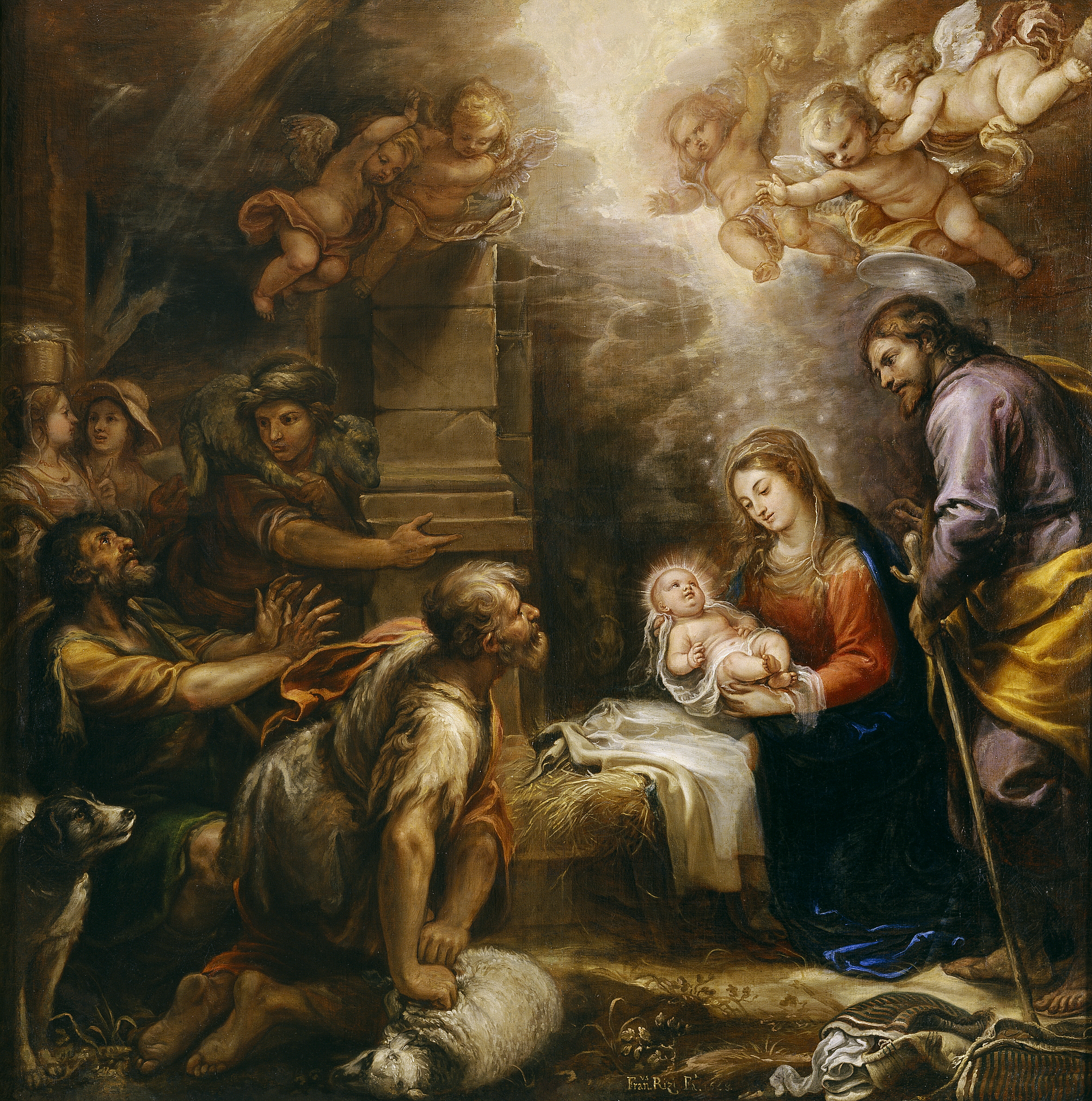 La obra representa el momento en que el Niño Jesús fue adorado, en presencia de la Virgen María y de San José, por los pastores de Belén.